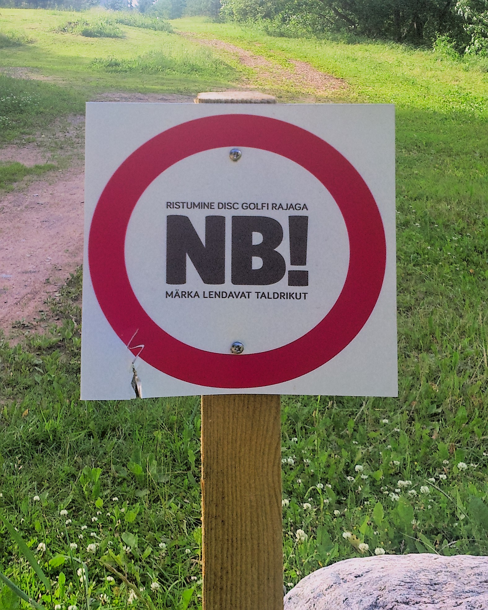 Hoiatussilt 'Märka lendavat taldrikut' Tartus, Tähtvere spordipargi taldrikugolfirajal, 3. juuli 2014